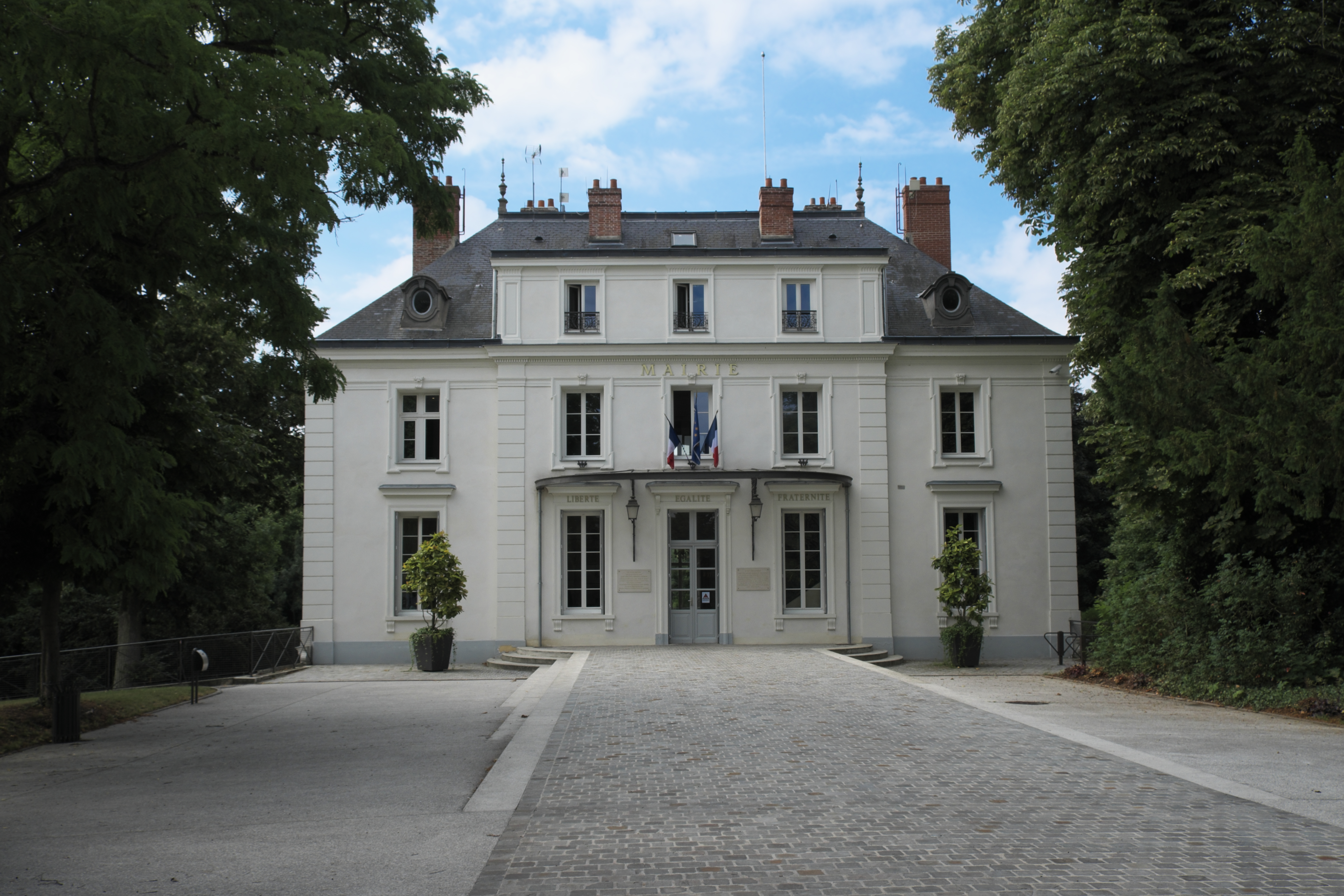 Rathaus (Mairie) in Boussy-Saint-Antoine im Département Essonne (Île-de-France/Frankreich)